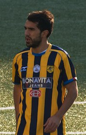 Marco Sau con la maglia della Juve Stabia